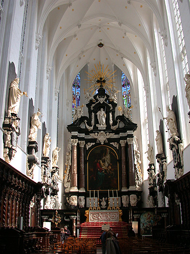 Antwerpen: Pauluskerk. Interieur.